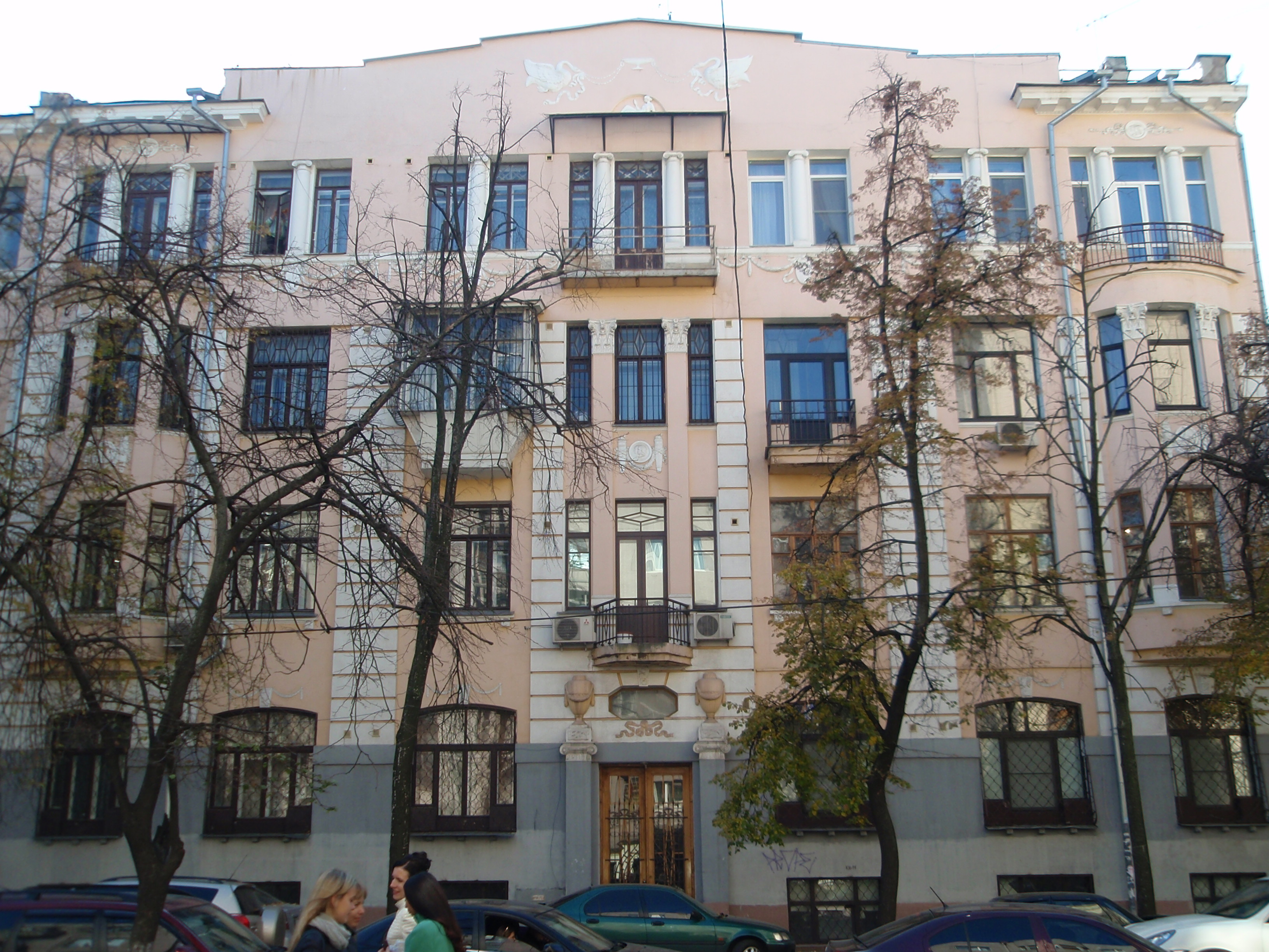 Житловий будинок, Харків, вул. Іванова, 24